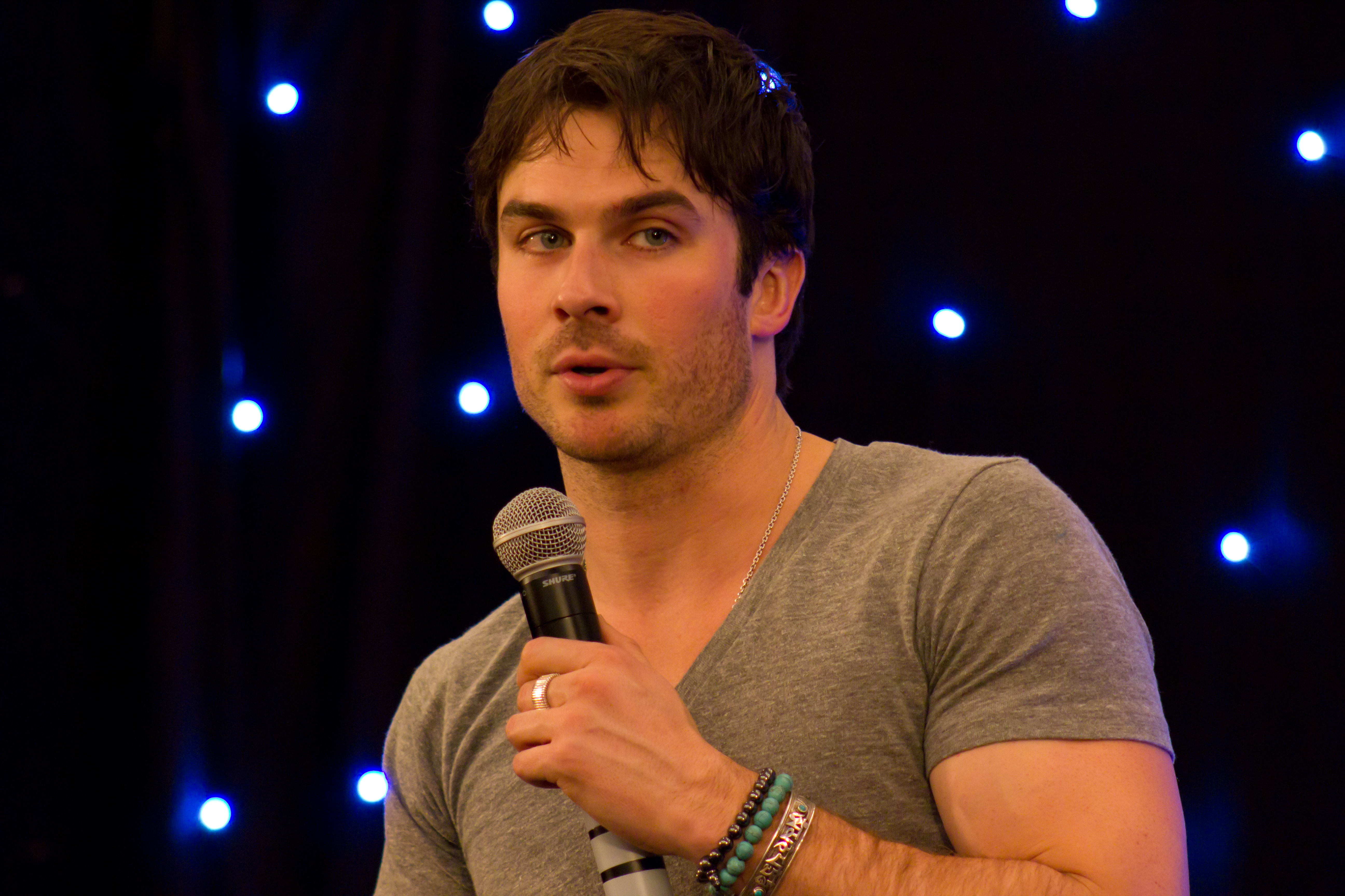 Ian Somerhalder